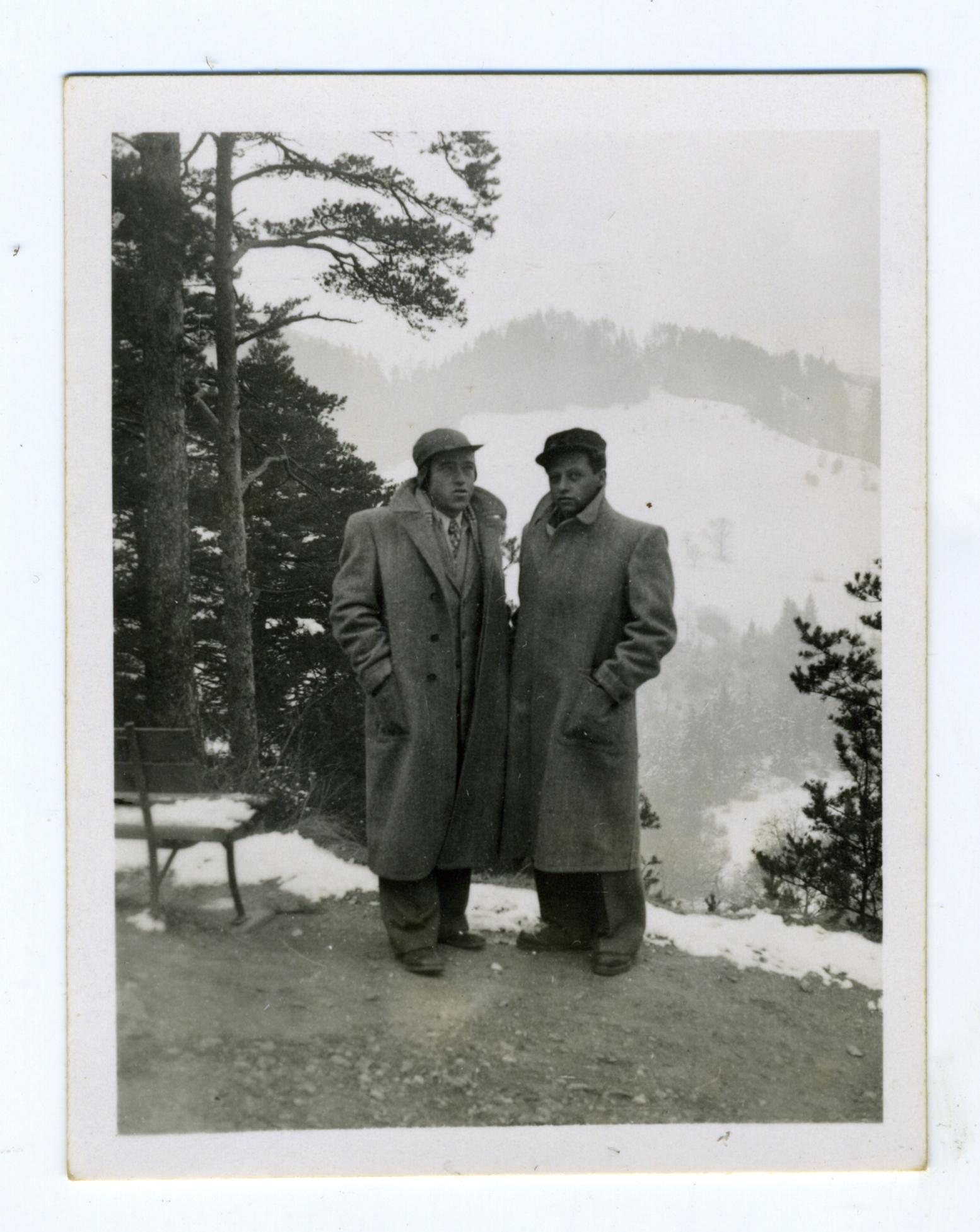 צבי כרמל וגדעוני נוסף באינסברוק, בביקור במחנה הפליטים היהודיים, 12/1948